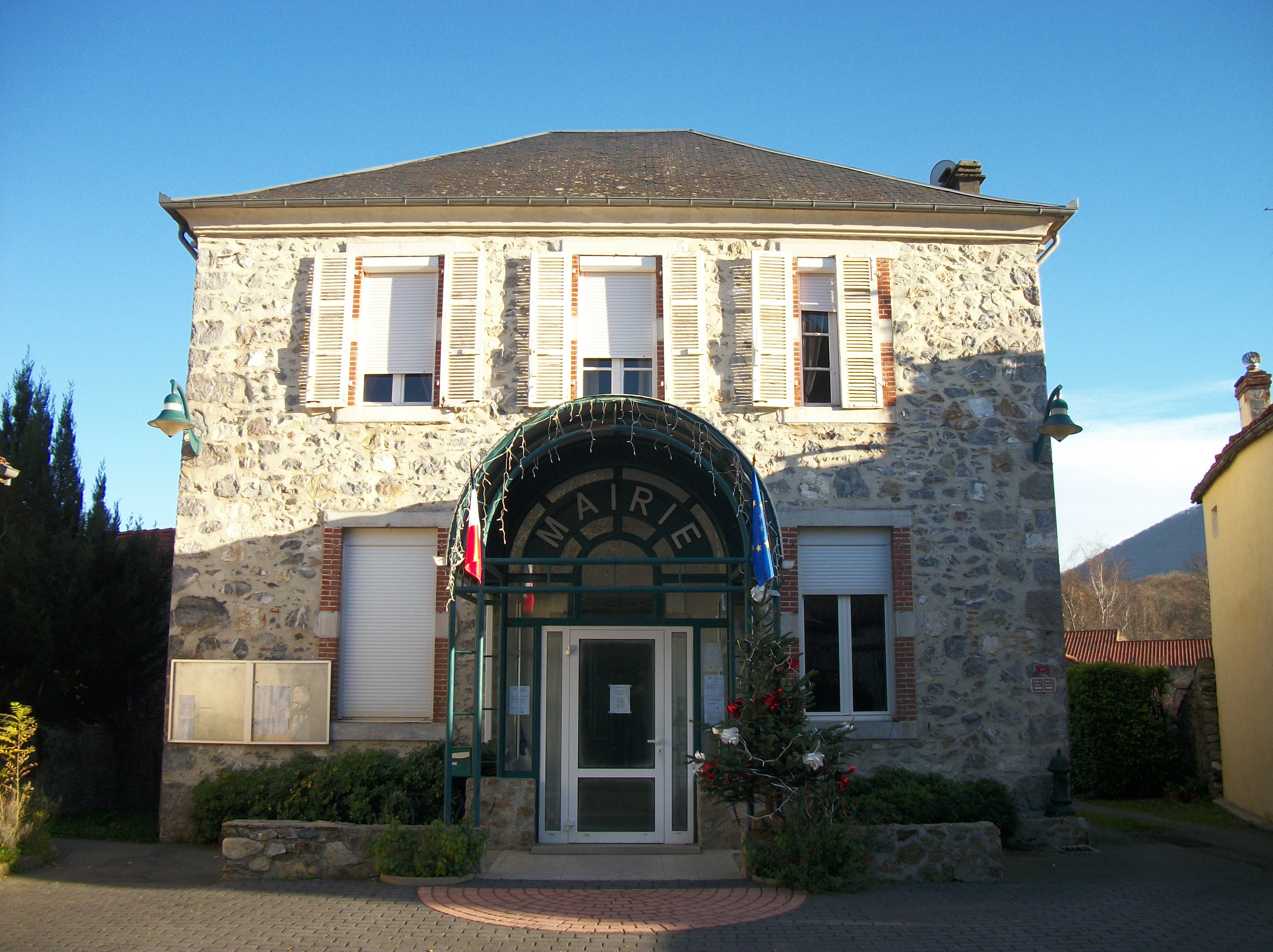 Mairie